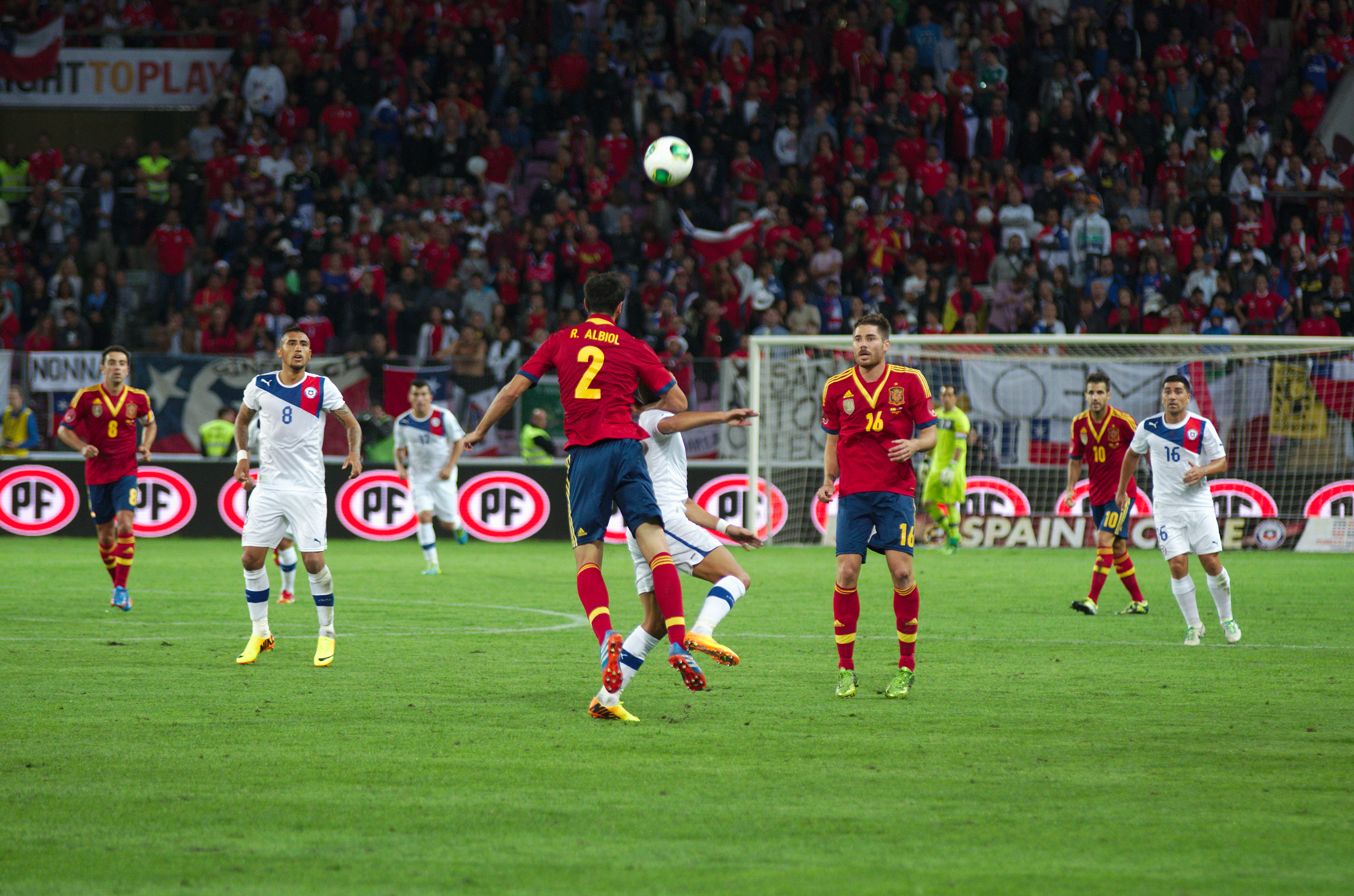 Spain - Chile - 10-09-2013 - Geneva - Arturo Vidal, Raul Albiol and Javi Garcia